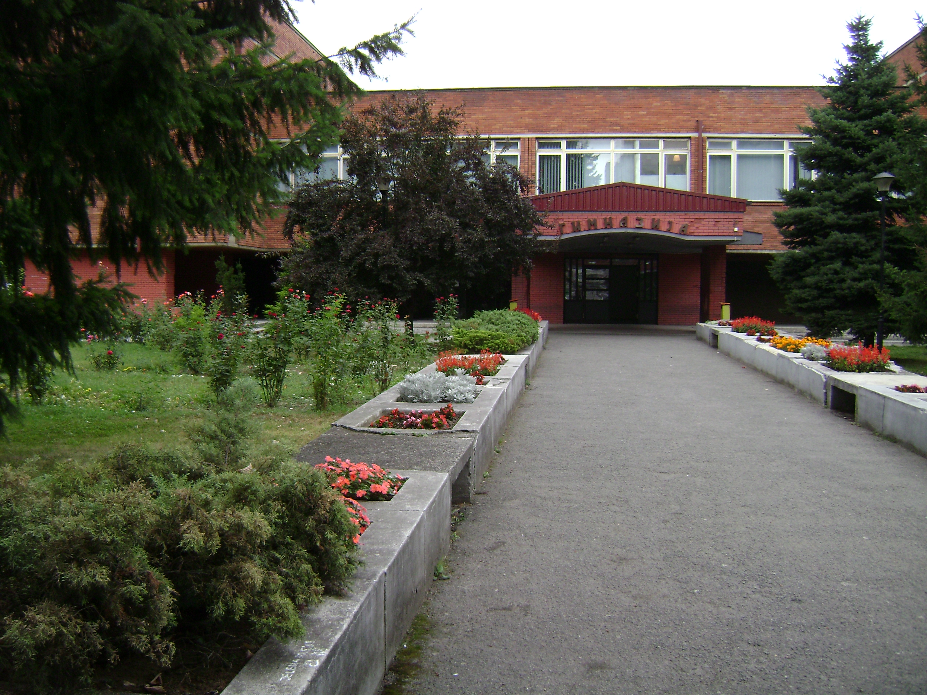 Улаз у Гимназију Бања Лука. Лично, дигиталним сонијевим фото-апаратом усликао Растко Вуковић, јуна 2008. године.